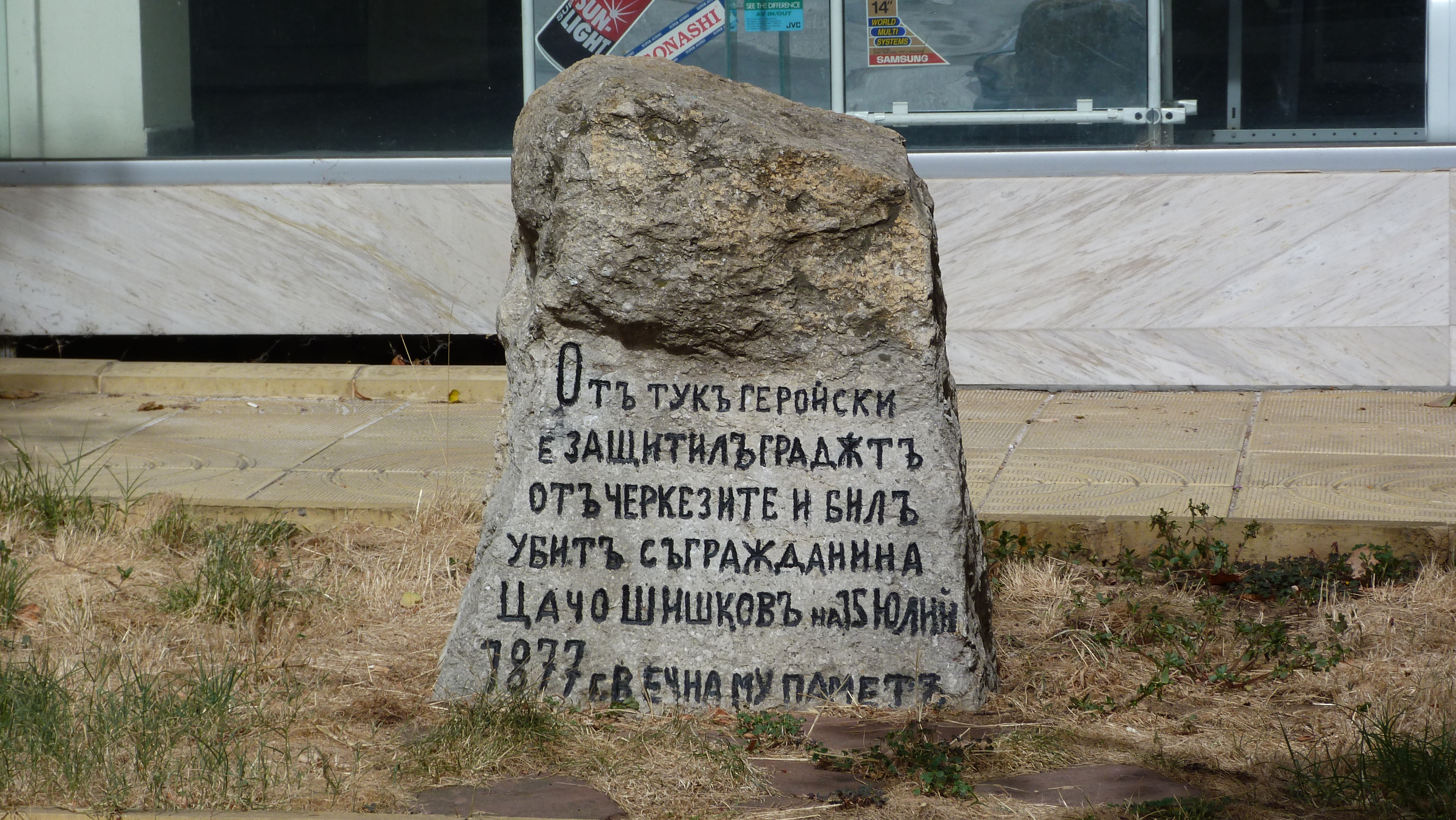 Памятный камень в честь Цачо Шишкова в Ловече (Болгария)